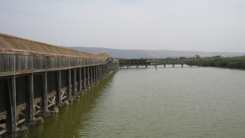 Hula lake wooden bridge